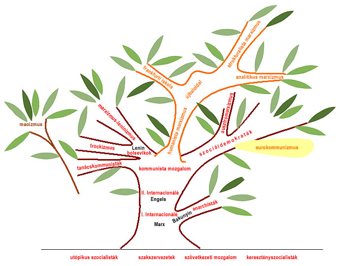 A baloldali ideológiák családfája a XIX. század közepétől a XX. század végéig